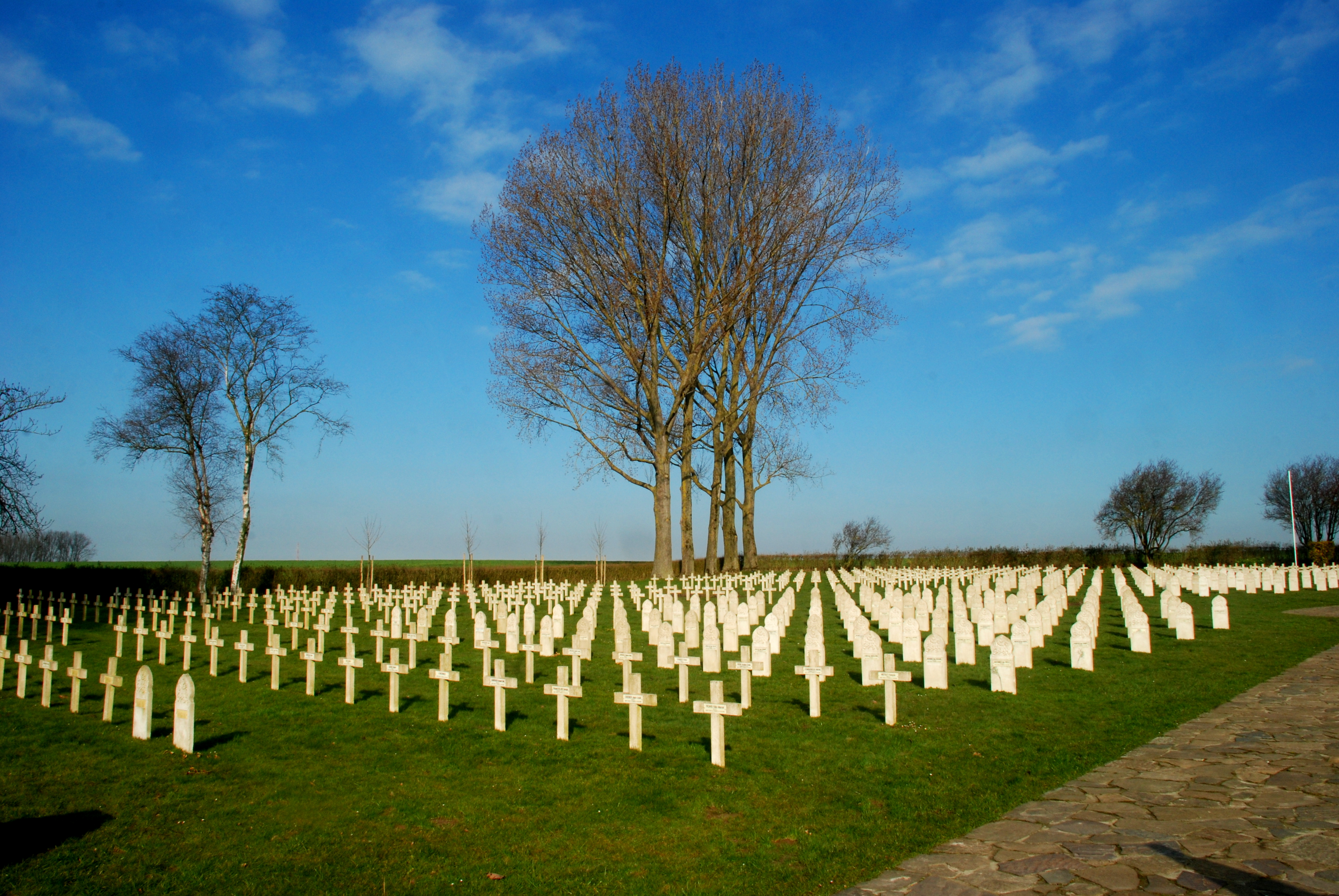 Belgique - Brabant wallon - Chastre - Nécropole française